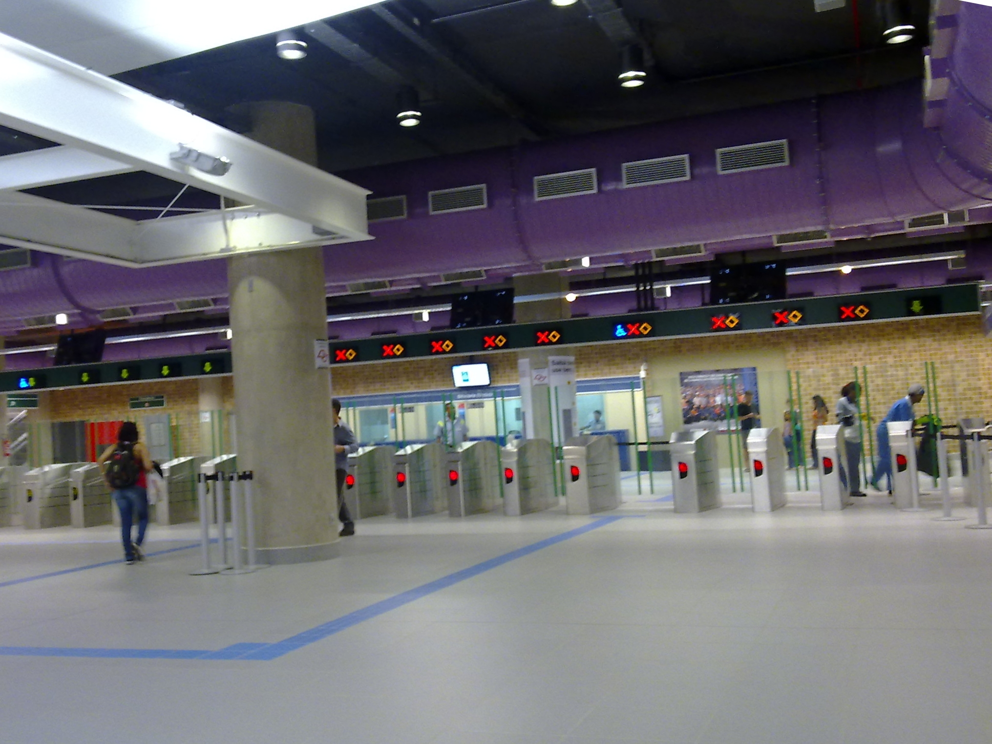 Bloqueios automáticos da estação Sacomã do Metrô de São Paulo, linha verde paulistana.